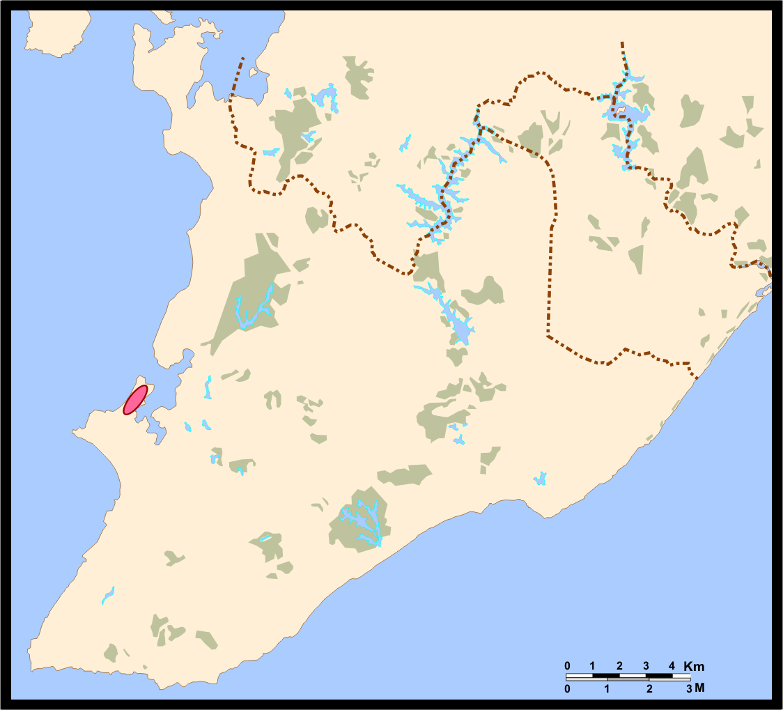 Mapa de Salvador (Bahia, Brazil) - Ribeira